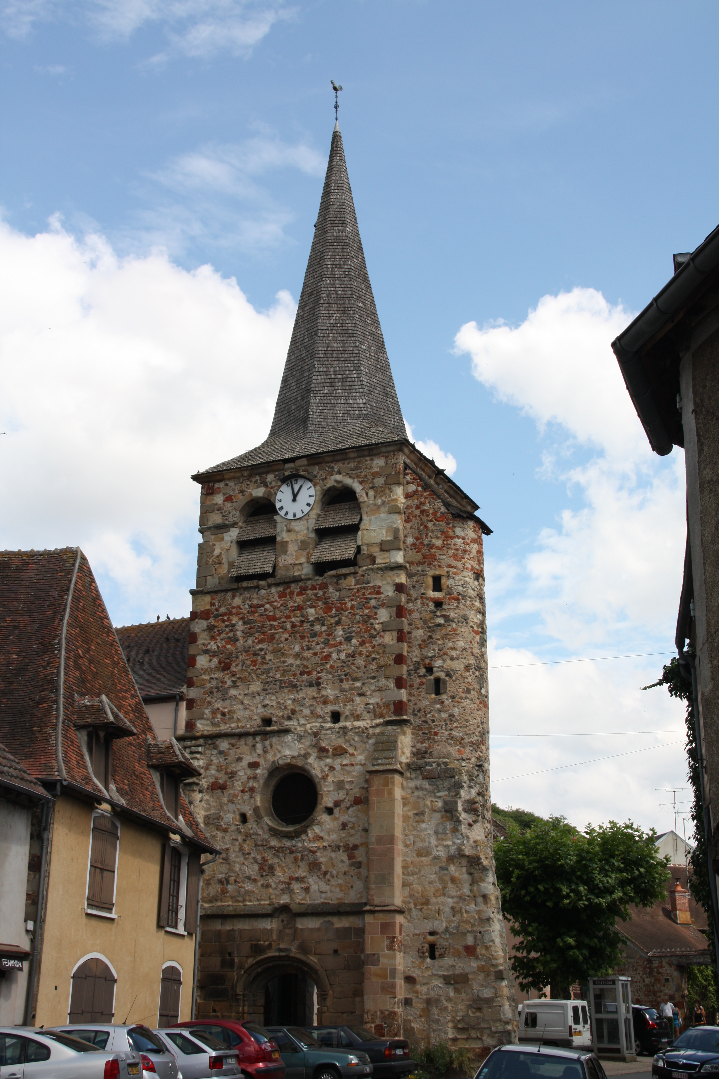 Hérisson, France